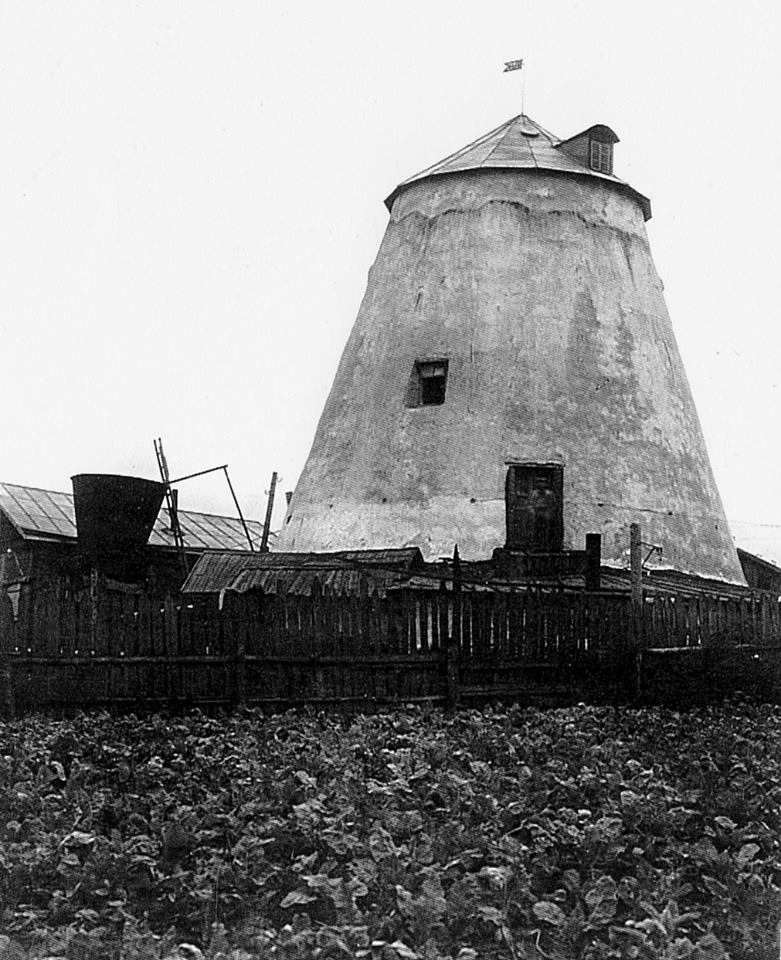 Šmidto malūnas 1936 m.